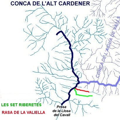 Mapa de la conca alta del Cardener (Vall de Lord, Solsonès) en el qual hi apareixen destacades la Rasa de la Valiella i Les Set Riberetes.